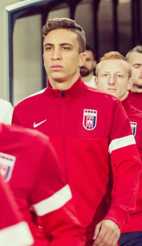 chakla